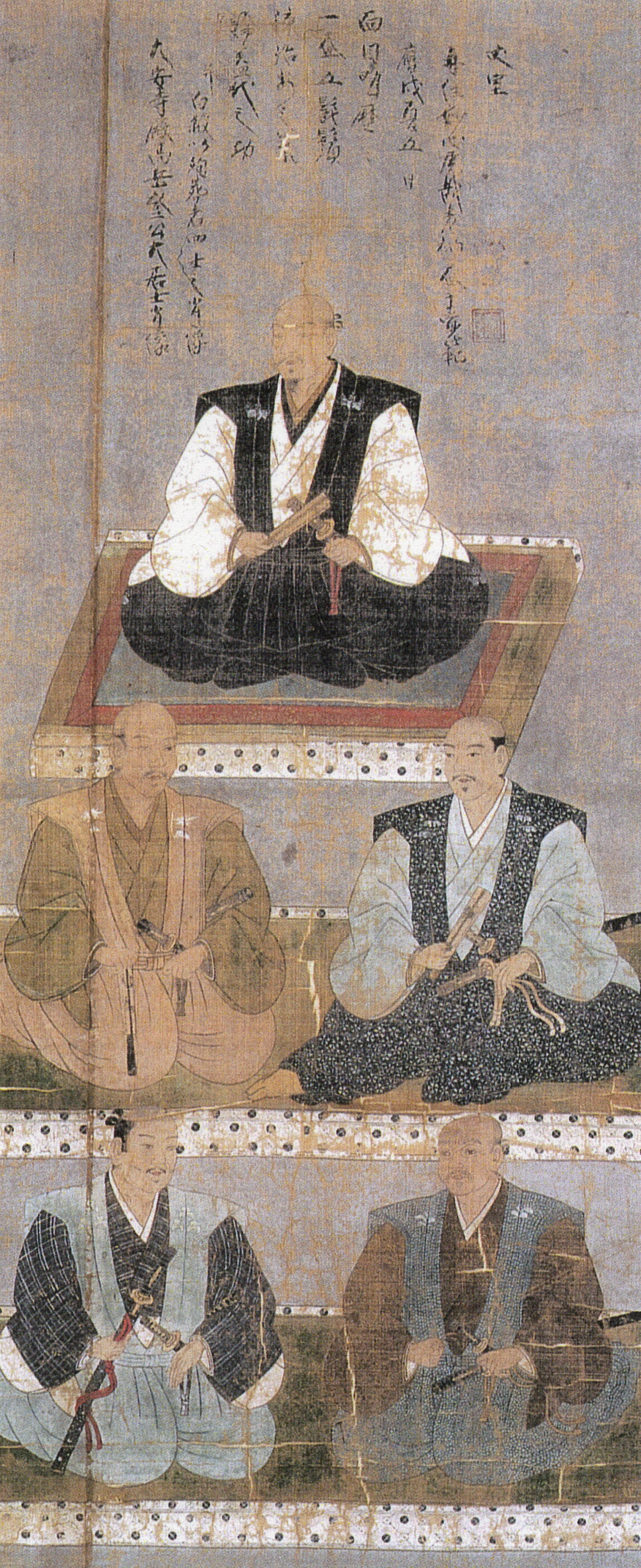 留守政景と殉死者の肖像。